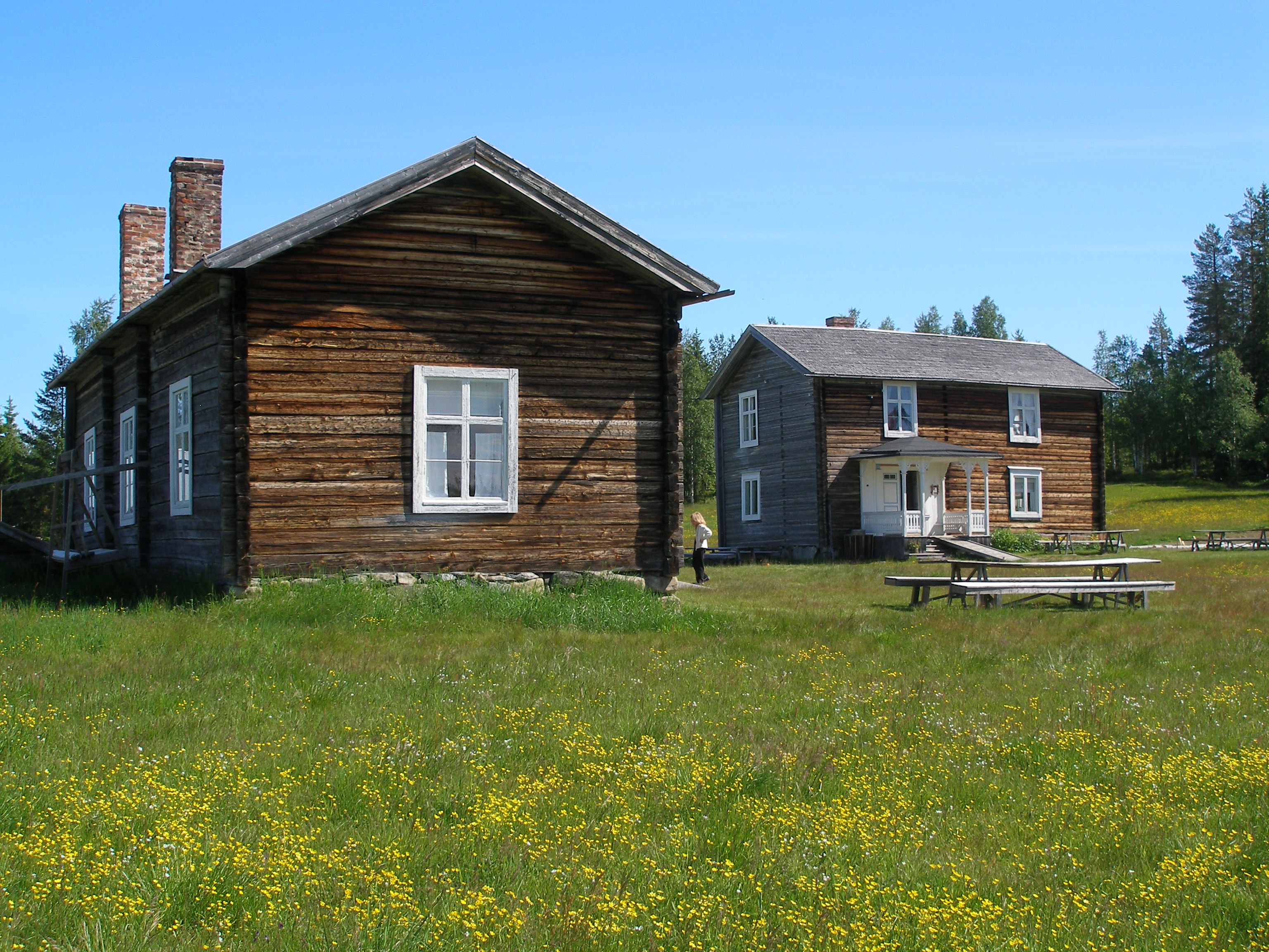 Byggnader i Rismyrliden, Skellefteå kommun. Till höger huvudbyggnaden, "Lars stugan", och till vänster broderns hus, "Brorers".